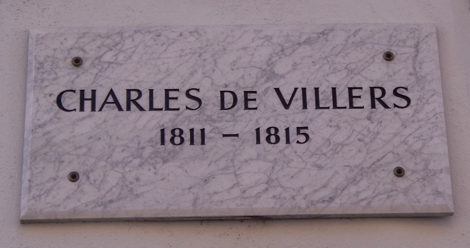 Göttinger Gedenktafel für Charles de Villers (* 1765; † 1815) in der Lange-Geismar-Straße 49.